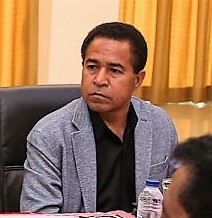 Arcângelo Leite bei der Sitzung des Staatsrats